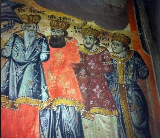 Александар Македонски прикажан на фрескопис во црквата „Св.Великомаченик и Победоносец Ѓоргија“ од XVI век, во селото Бањани кое се наоѓа во подножјето на Скопска Црна Гора.